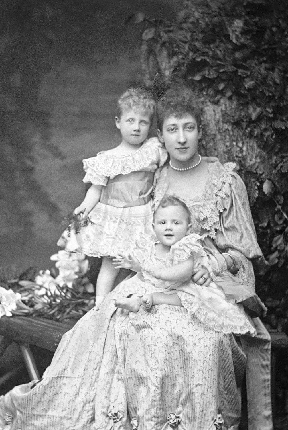 Porträt Louises, Herzogin von Fife, mit ihren beiden Töchtern Alexandra und Maud